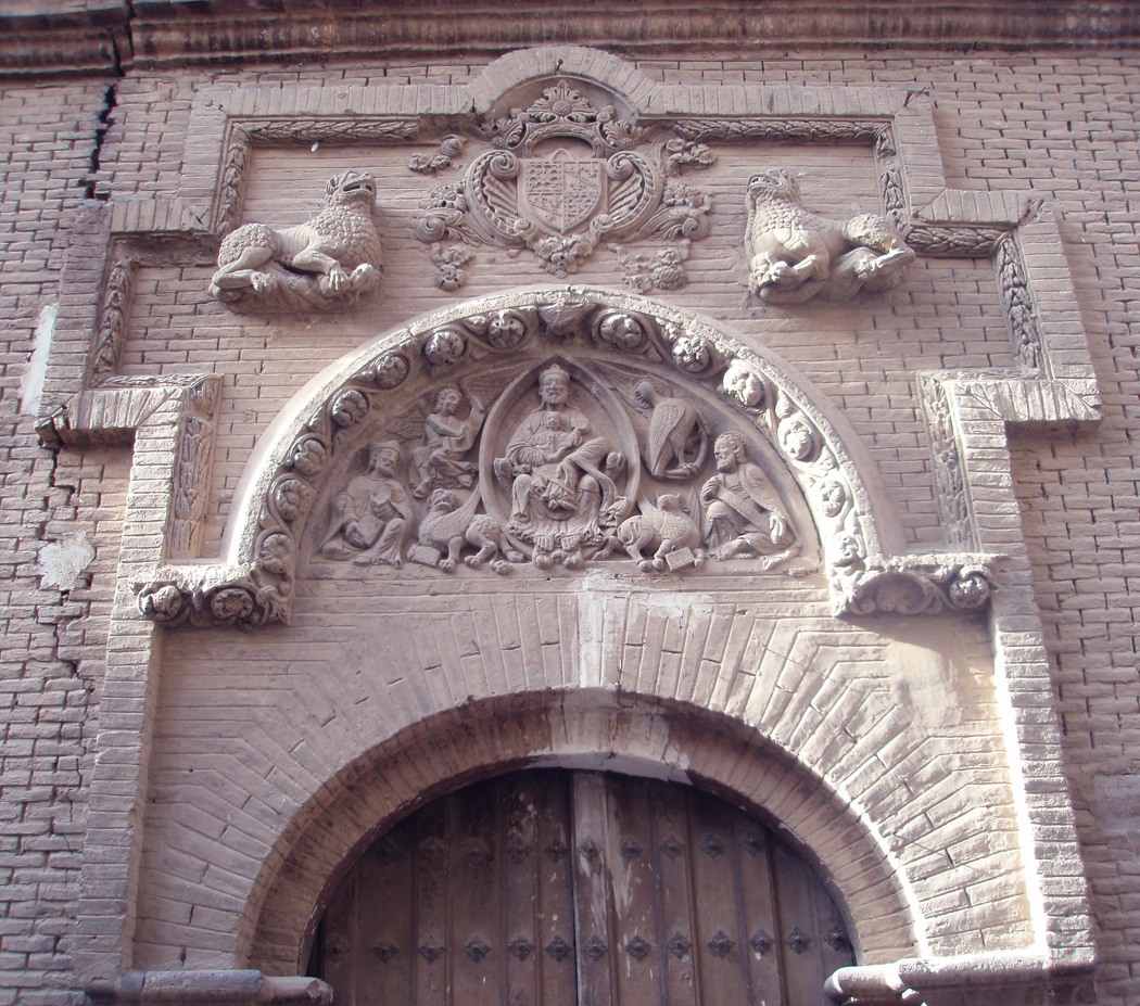 Portada de la Iglesia de San Nicolás de Bari (Tudela, Navarra).